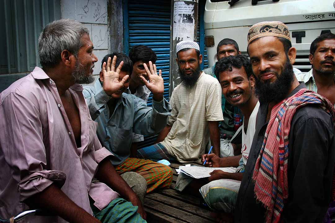 Bangladeshi men smiling, Dhaka.